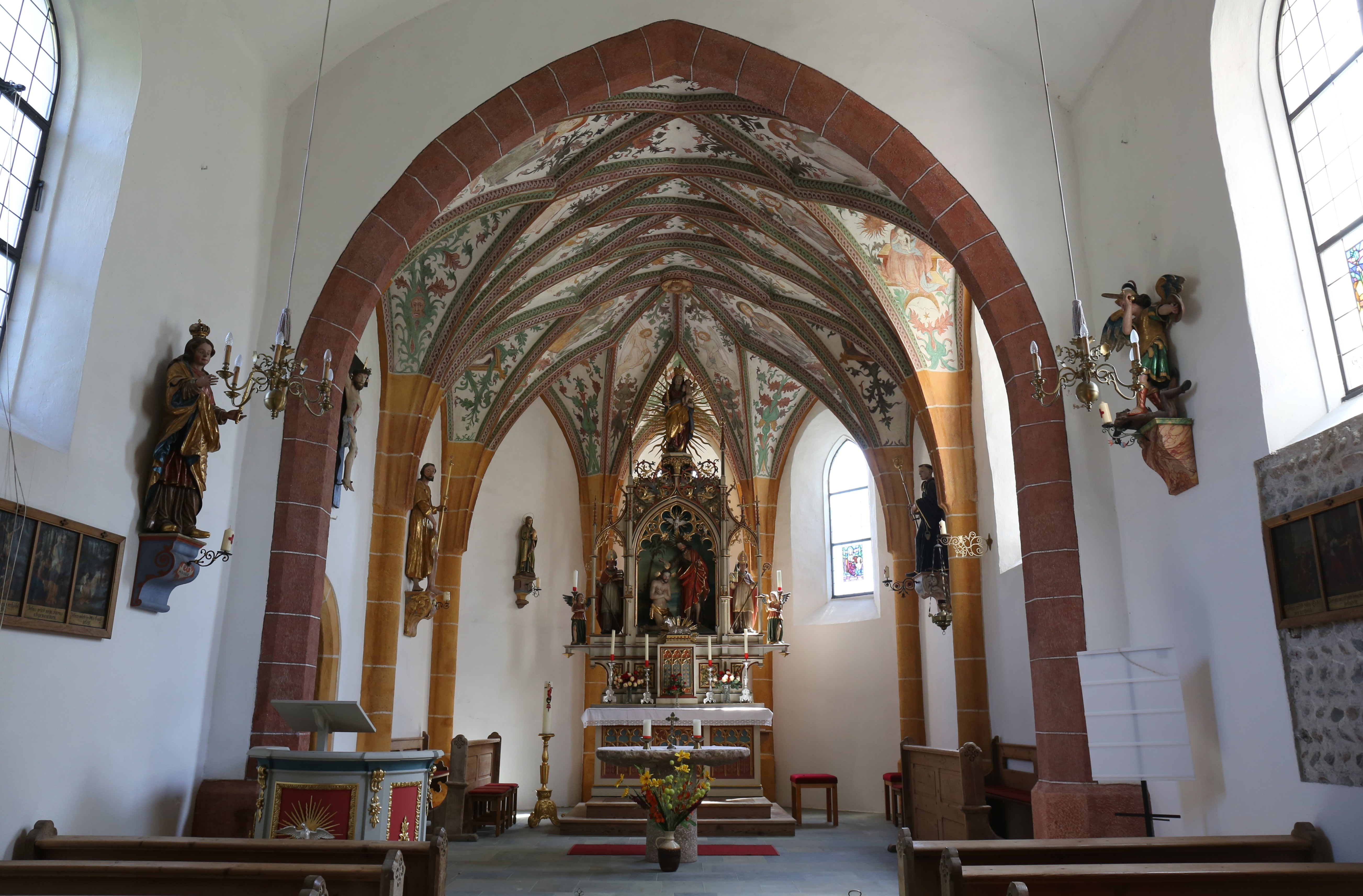 Kath. Filialkirche hl. Johannes der Täufer und ehem. Friedhof; Kleinsöll, Breitenbach am Inn; frühmittelalterlicher Vorgängerbauum 700 archäologisch befundet. romanische Saalkirche mit Rechteckchor wohl 11. Jahrhundert, davon Teile des Turmes und Teile der Süd- und Nordwand erhalten. Im späten 15. Jahrhundert und im 17.Jahrhundert verändert. This media shows the remarkable cultural object in the Austrian state of Tyrol listed by the Tyrolean Art Cadastre with the ID 2694. (on tirisMaps, pdf, more images on Commons)